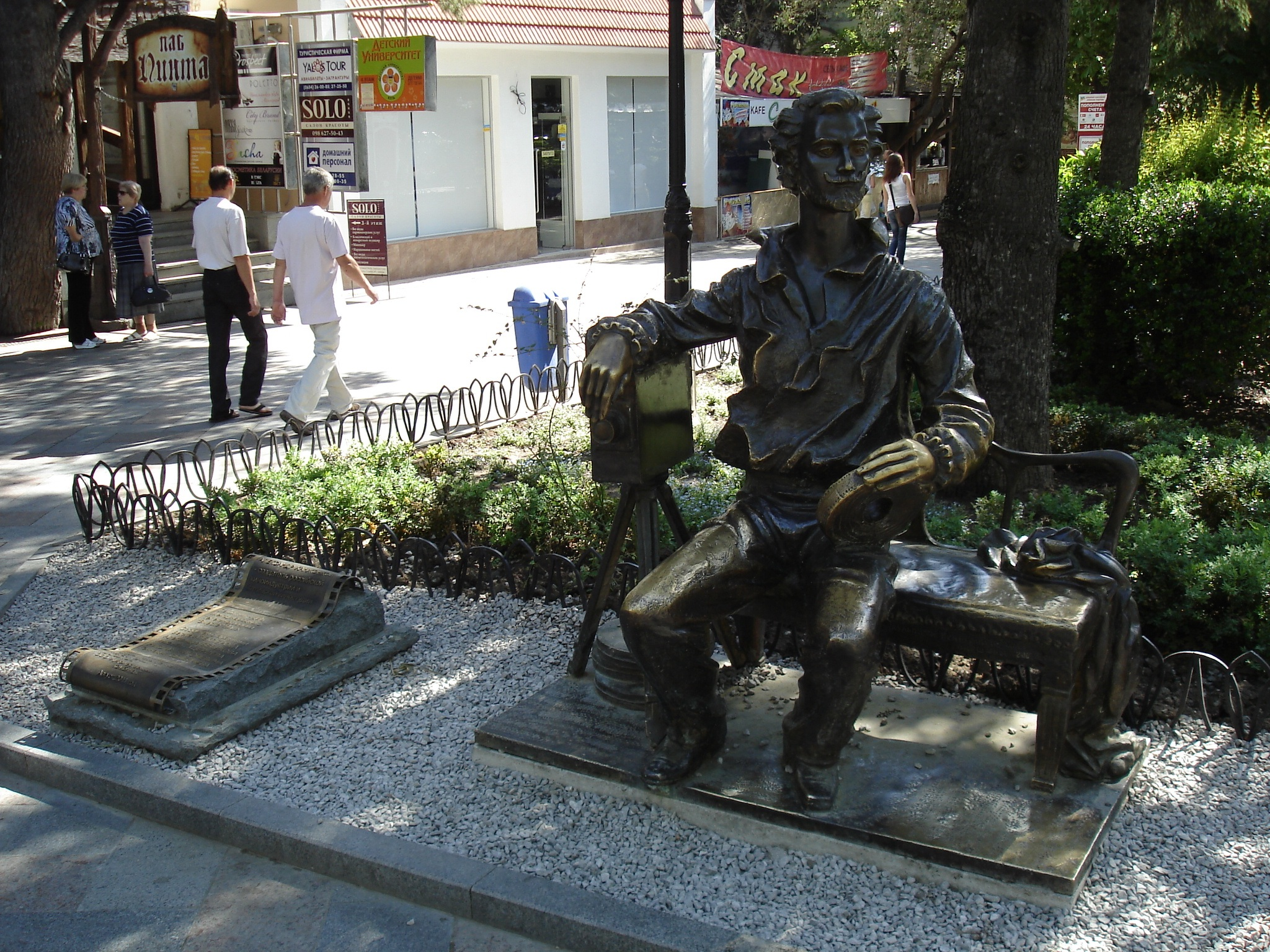 Памятник Александру Ханжонкову в Ялте